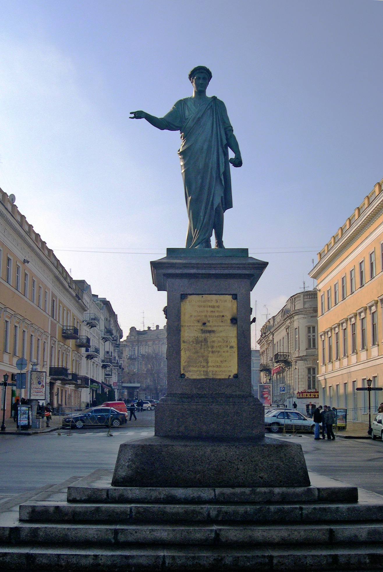 Ukraine, Odessa, Duke statue